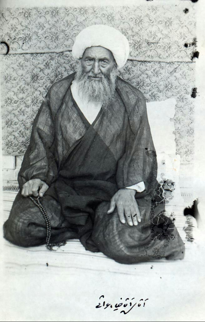 Ayatollah Sheikh Ziauddin Araki